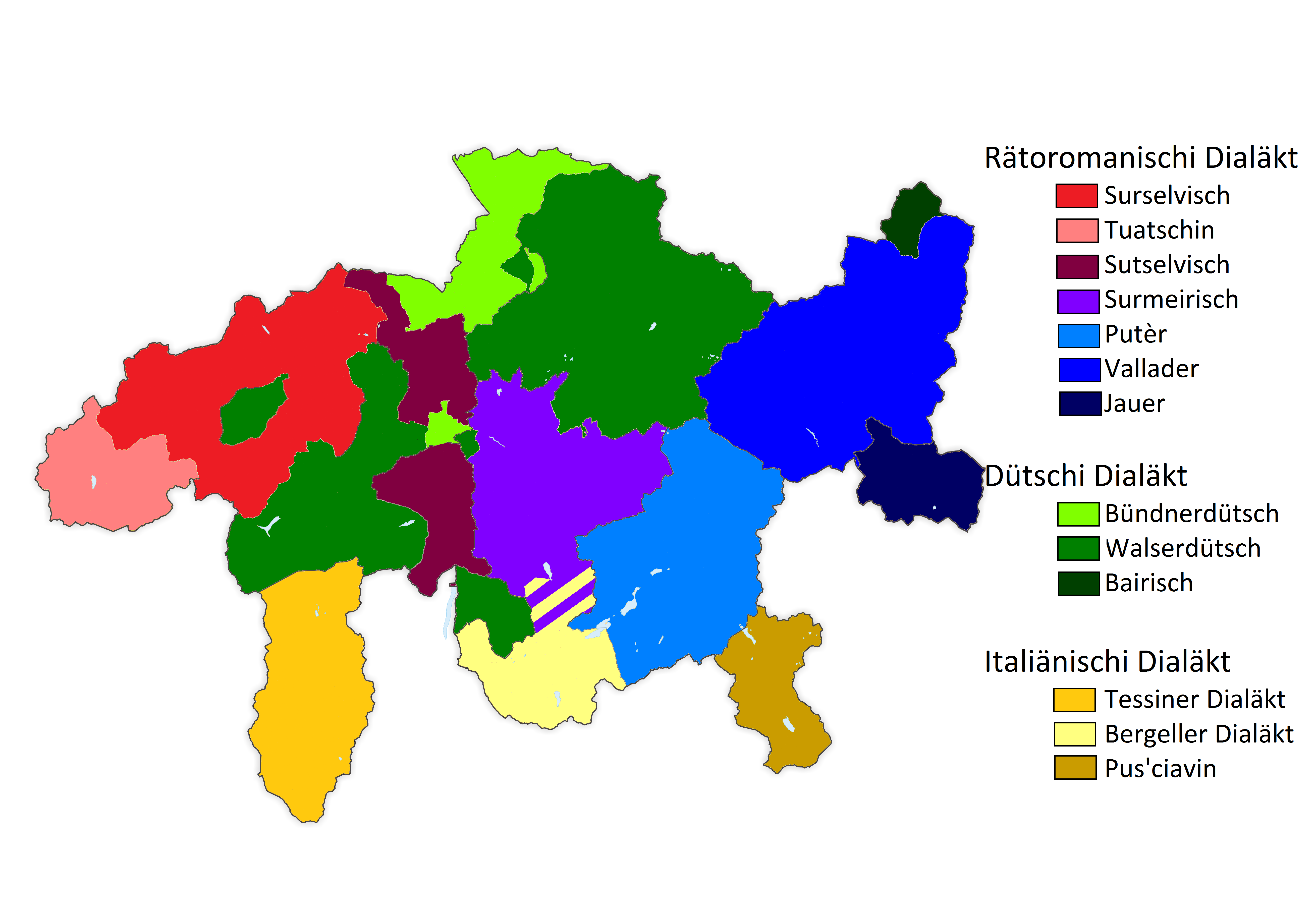 Die Mundarten in Graubünden